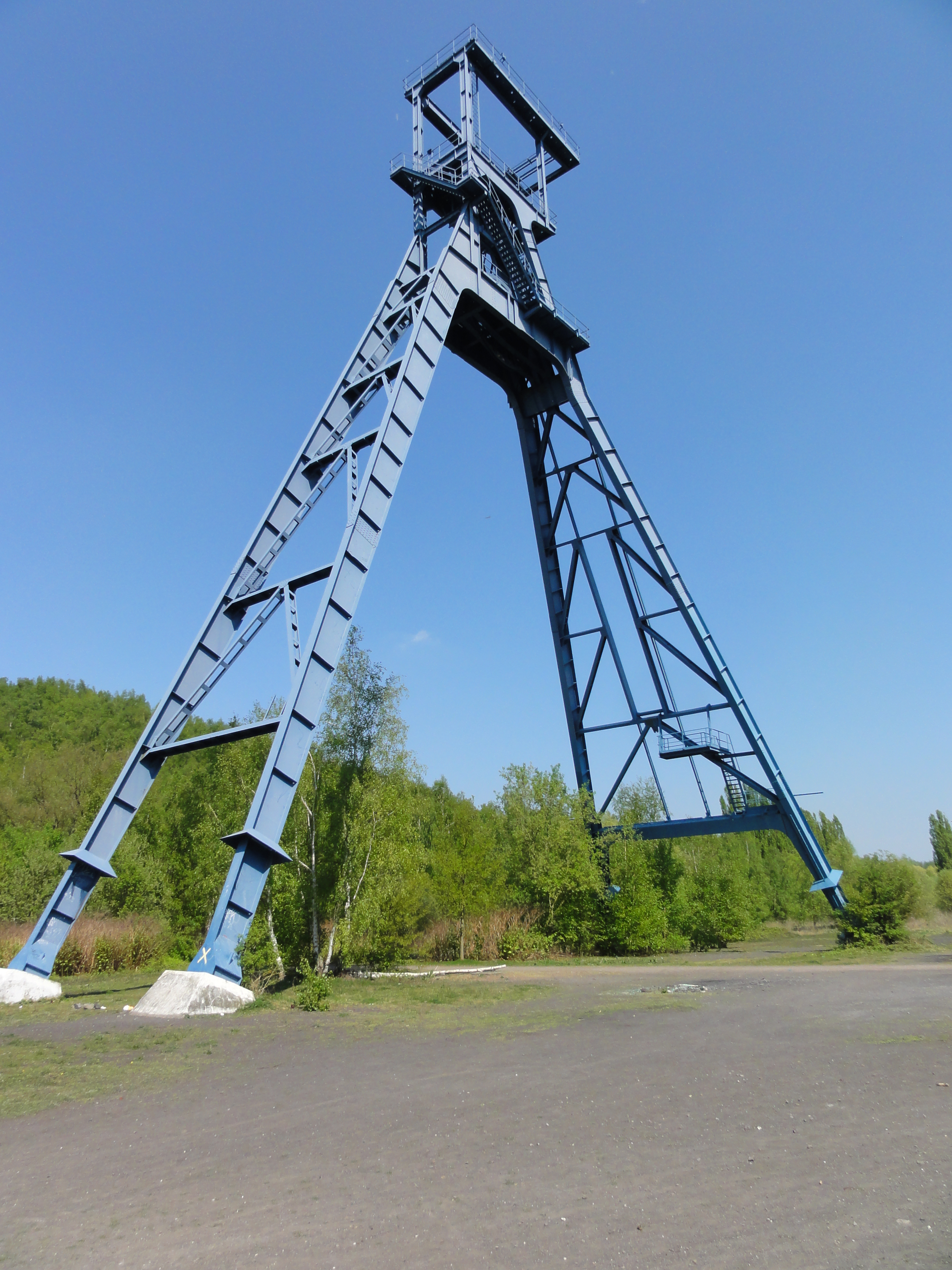 La fosse Sabatier de la Compagnie des mines d'Anzin était un charbonnage du bassin minier du Nord-Pas-de-Calais constitué de deux puits situé à Raismes, Nord, Nord-Pas-de-Calais, France. .